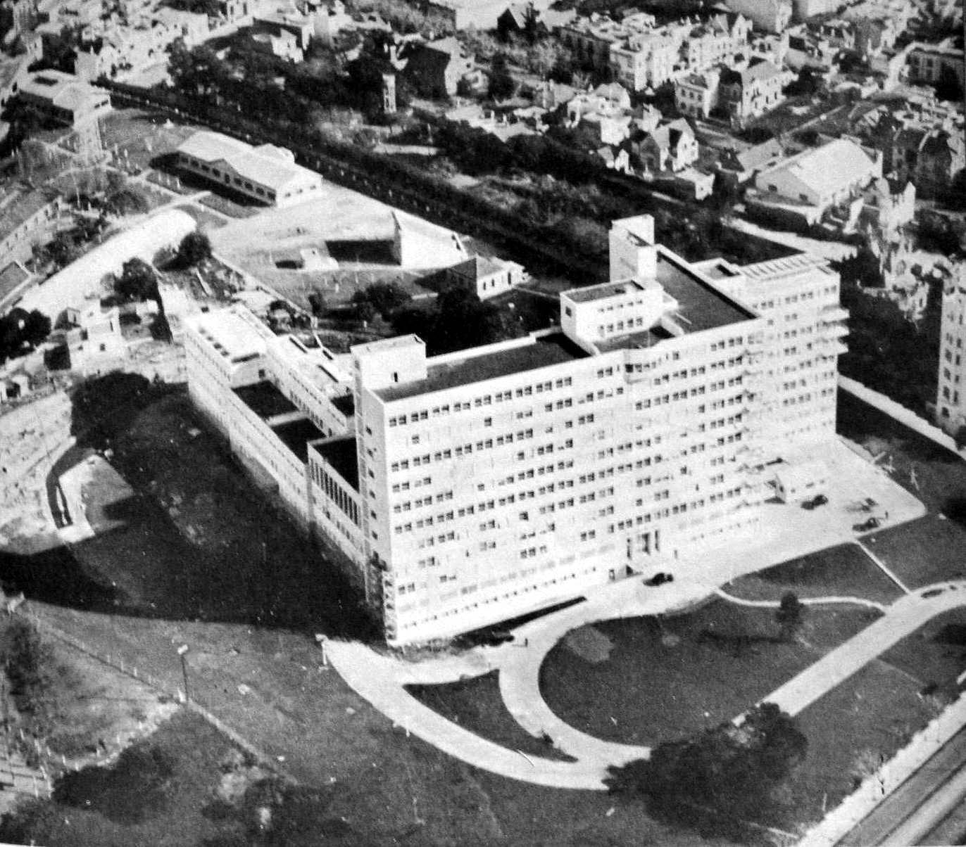 Vista aérea del nuevo Hospital Militar Central de Buenos Aires, junto a las construcciones a su alrededor. Arquitecto: Dirección General de Ingenieros del Ministerio de Guerra Año: 1939 Dirección: Av. Luis María Campos 726